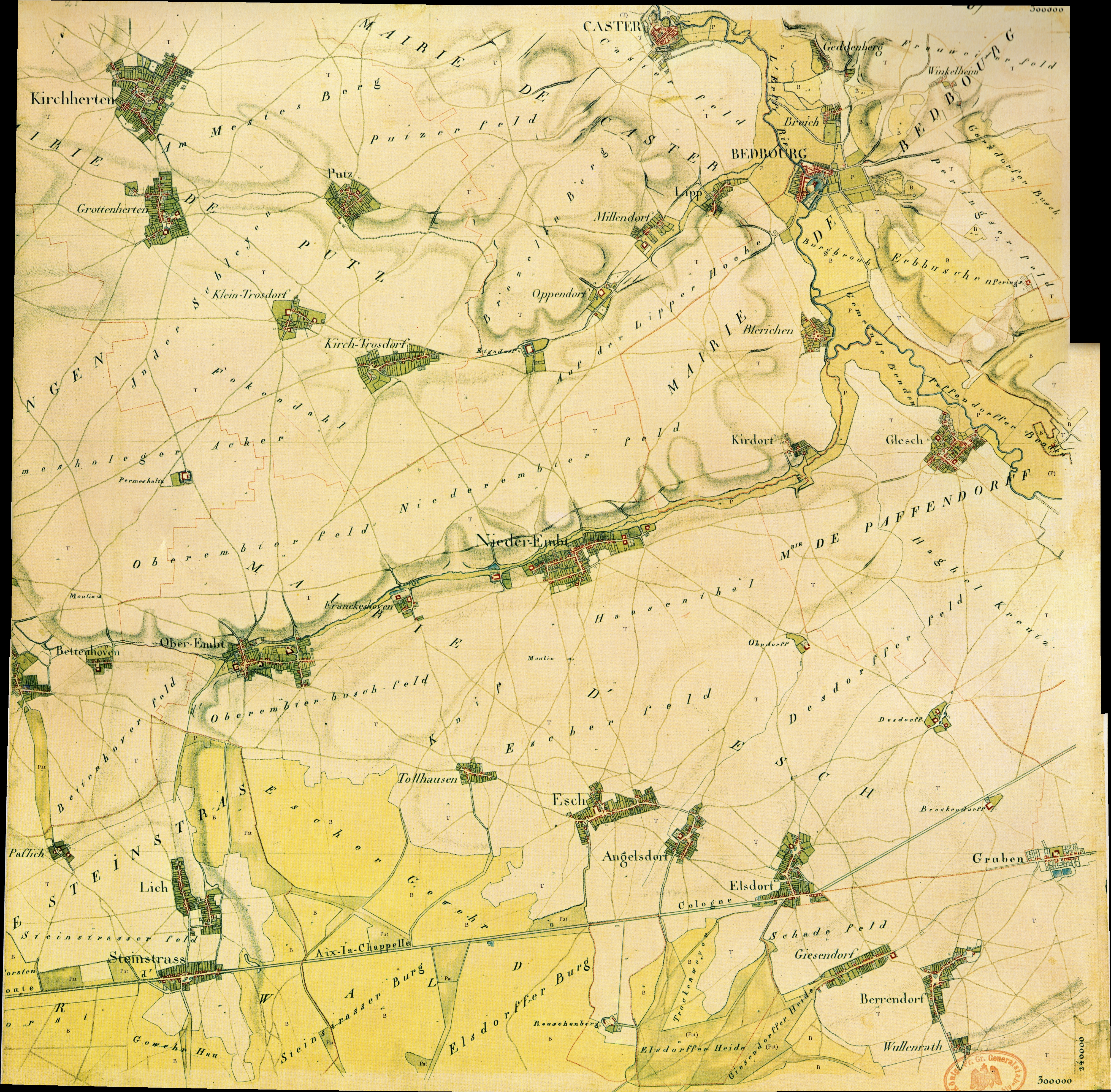 Kartenaufnahme der Rheinlande durch Tranchot und von Müffling 1803-1820 Blatt 69 - Bedburg